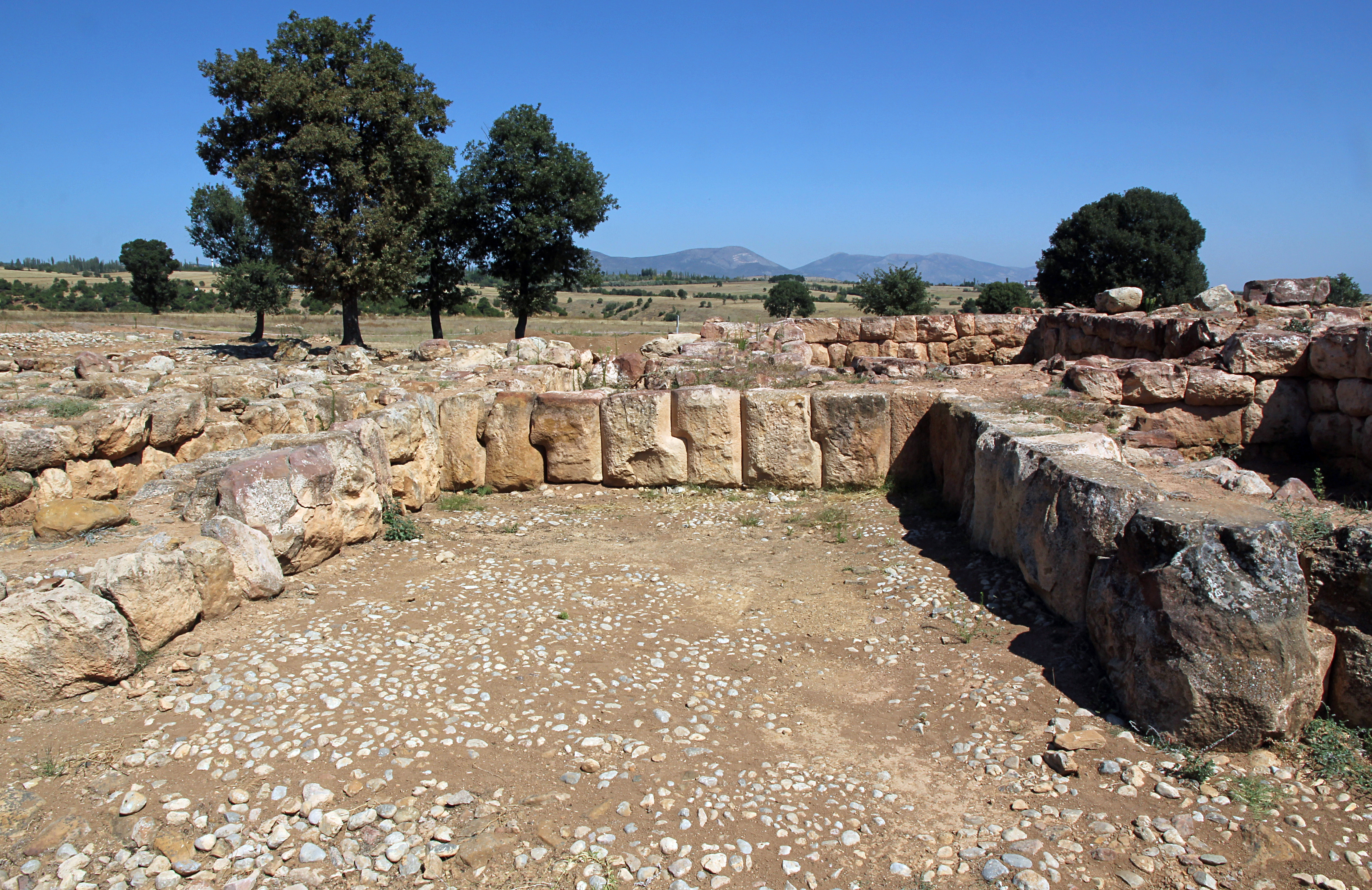 Šapinuwa/Ortaköy, hethitische Stadt bei Çorum, Zentraltürkei, Gebäude A von Südwesten